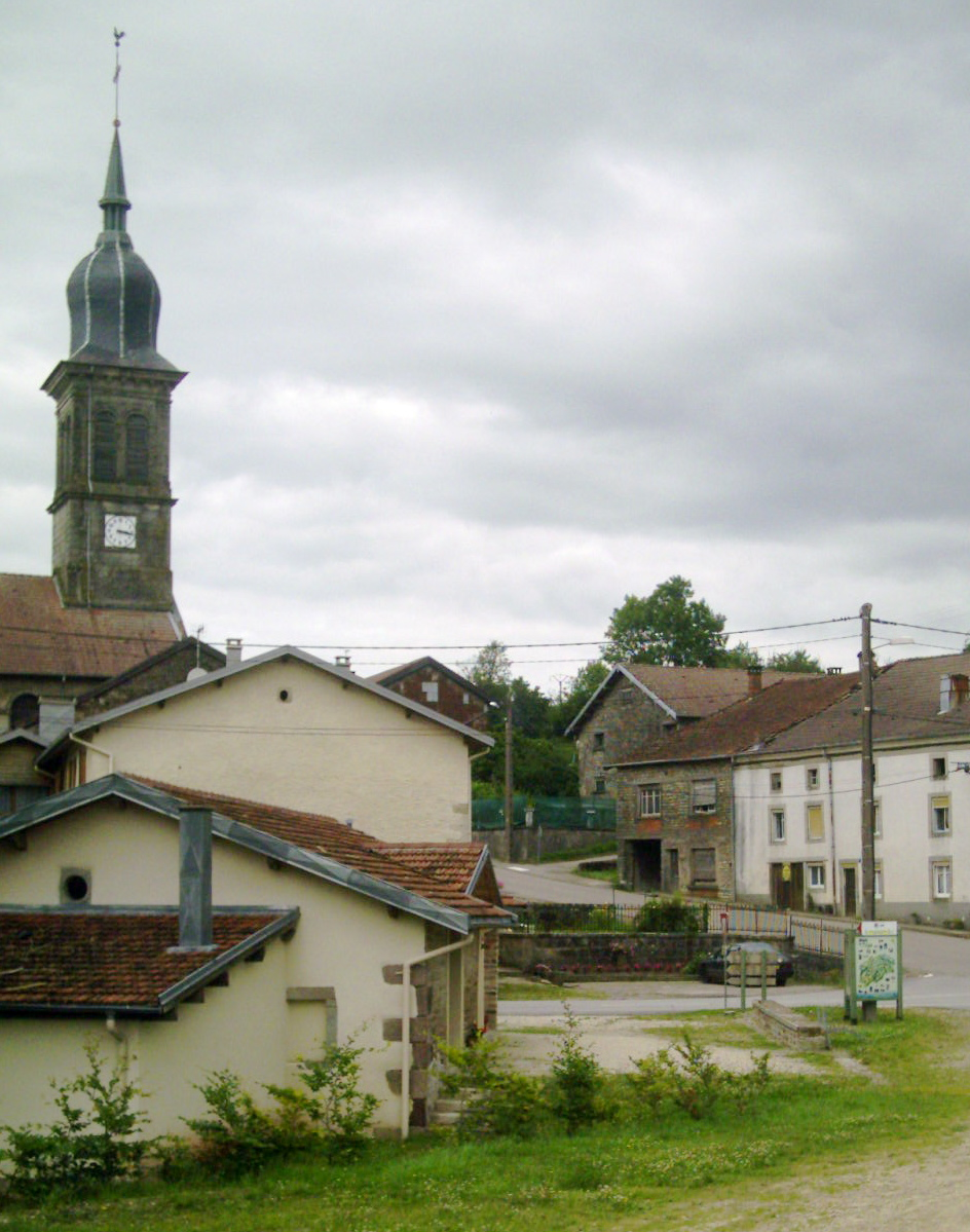 Commune de Les Voivres (88) : église et rue principale